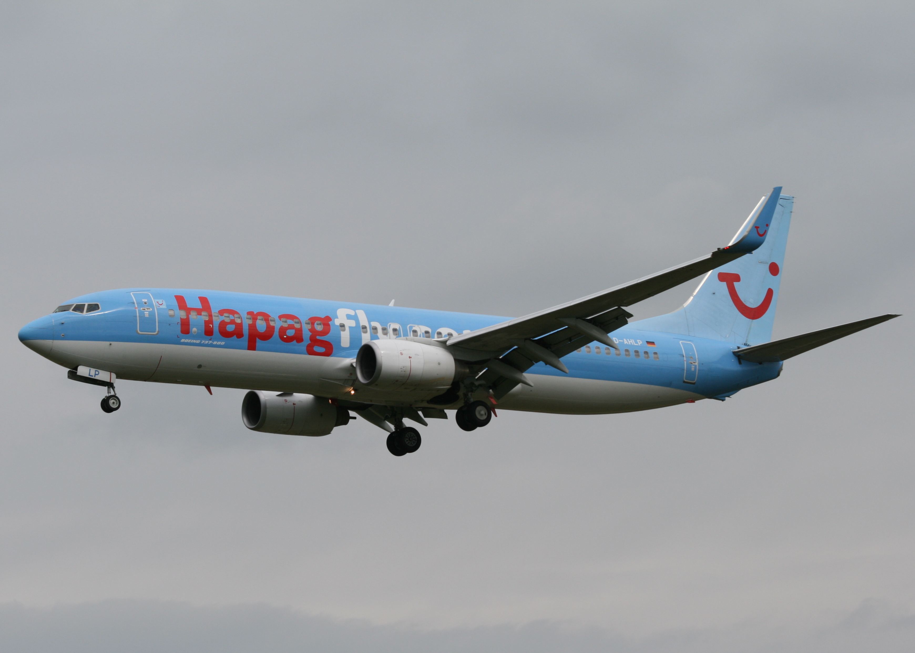 haj/eedv 13-04-08